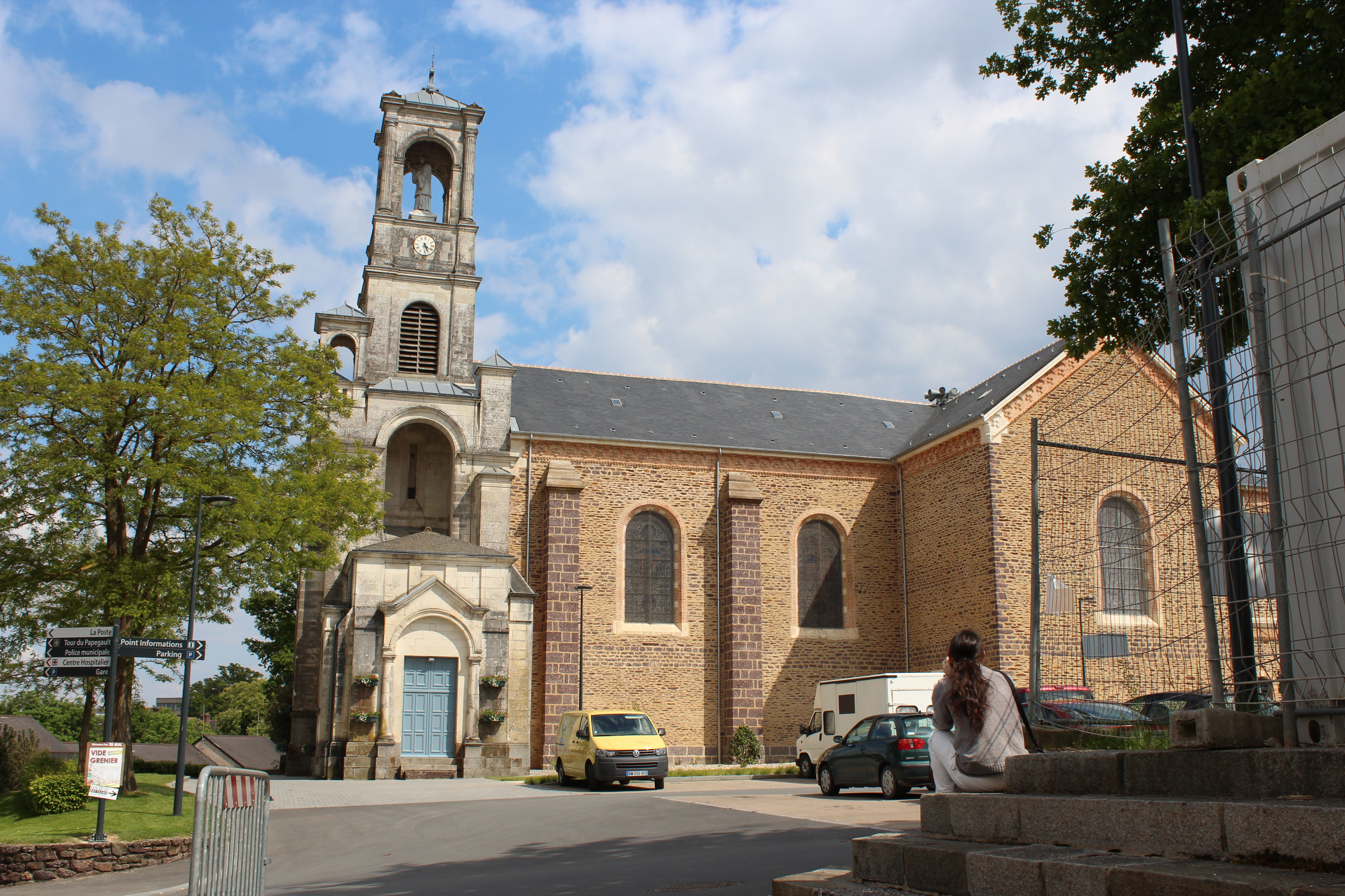 Église de Montfort-sur-Meu